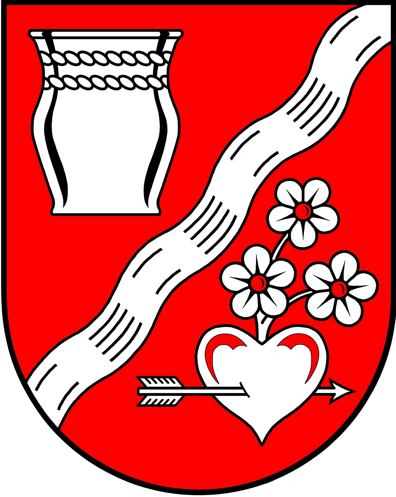 Wappen von Warza